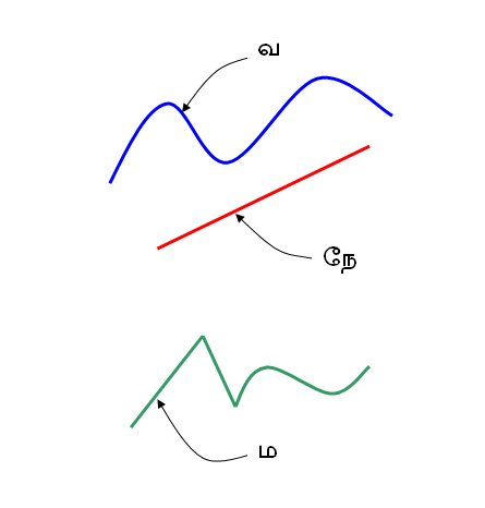 I, the author of this work, hereby release it into the public domain. This applies worldwide. In case this is not legally possible: I grant anyone the right to use this work for any purpose, without any conditions, unless such conditions are required by law. பகுப்பு:தமிழில் விளக்க வரைபடங்கள்